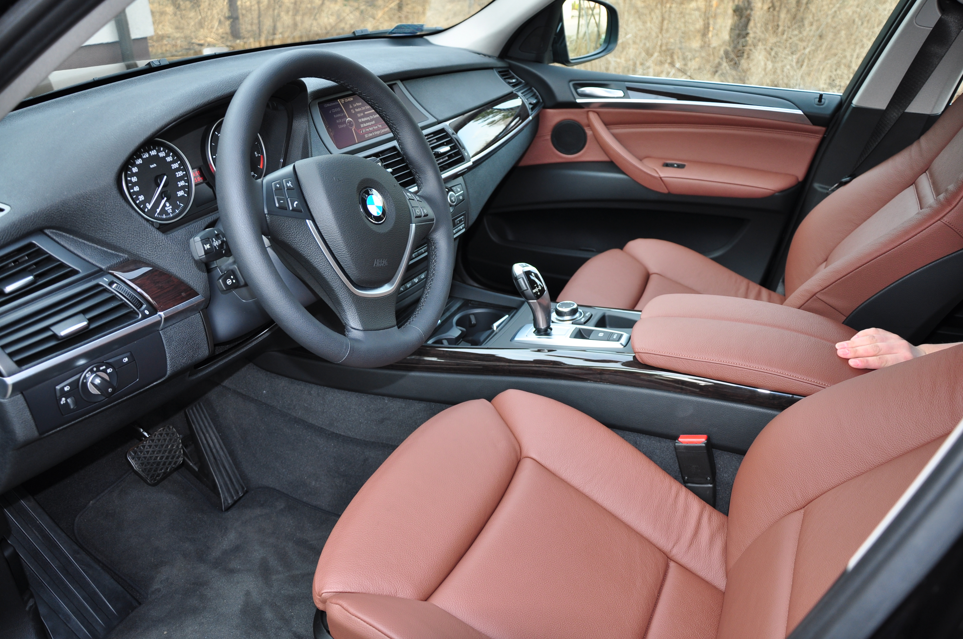 Wnętrze Bmw X5. Automat,skóra Nevada, 3,0d.